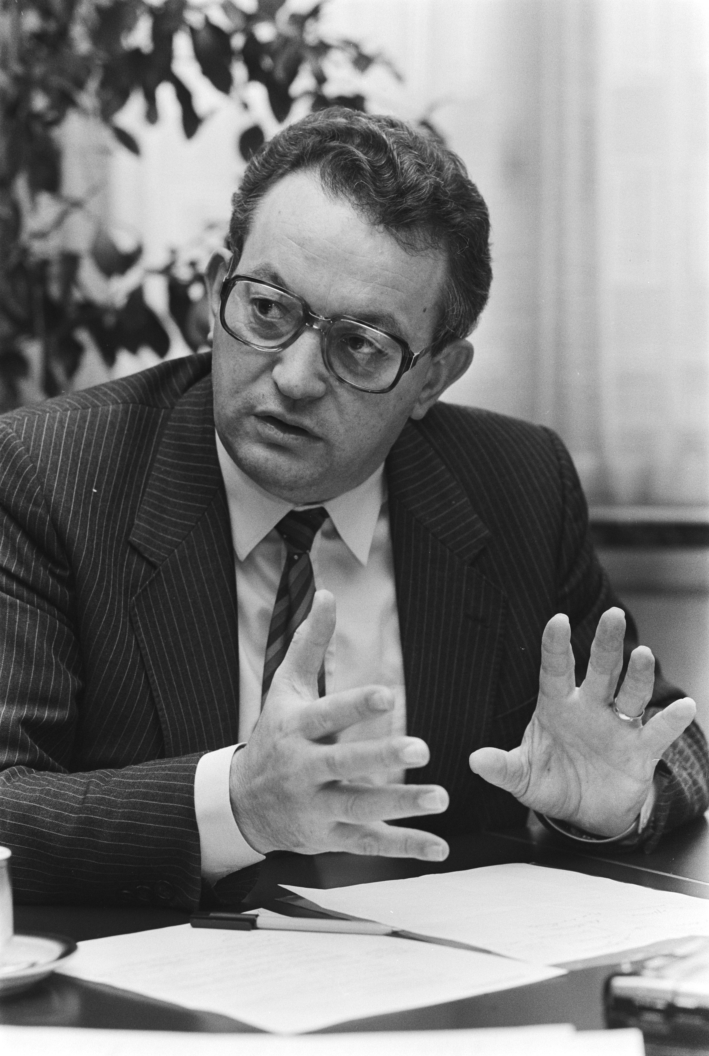 Opdracht Financieel Dagblad , minister Braks , close